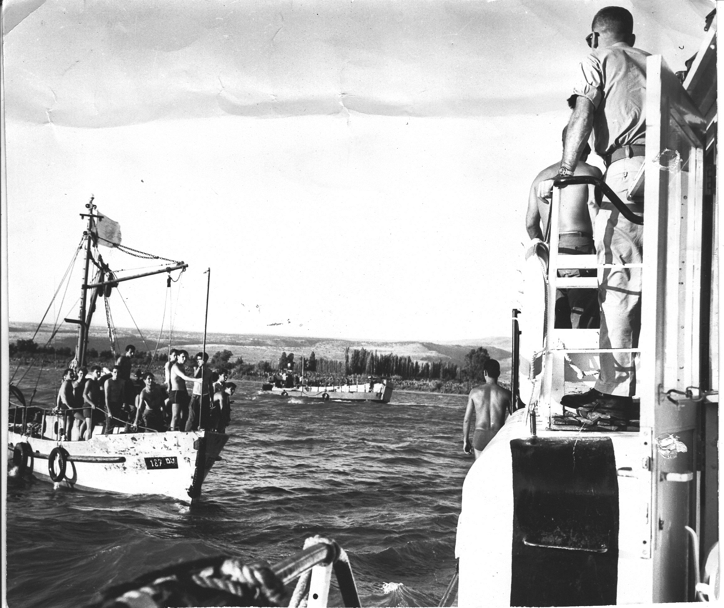 פעולת חילוץ נחתת מהשרטון ע"י צוללים ספינת דיג ונחתת אחרת